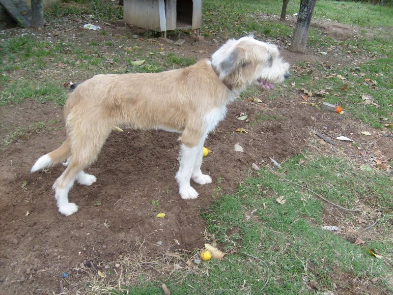 Cadela da raça barbudo caçador, de propriedade do senhor Maicon Pedroso, Rio Grande do Sul, Brasil.